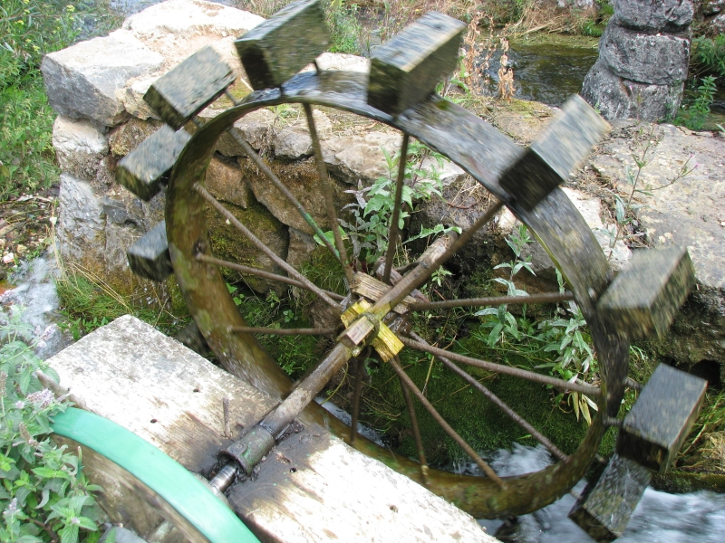 Das unterschlächtige Mühlrad, Majerovo vrilo, Gacka, Kroatien